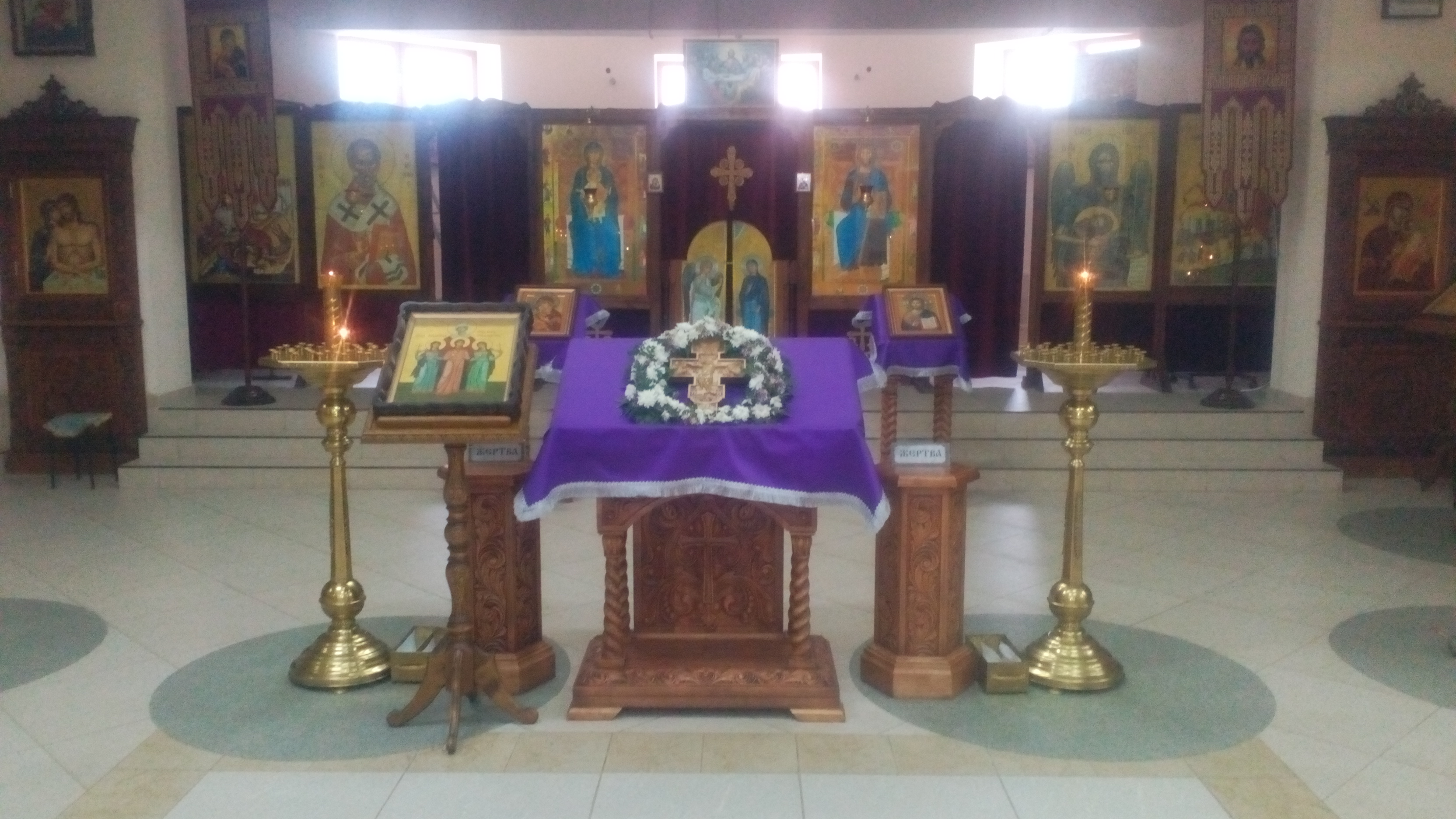 Храм Благовещения Пресвятой Богородицы в Ростове-на-Дону